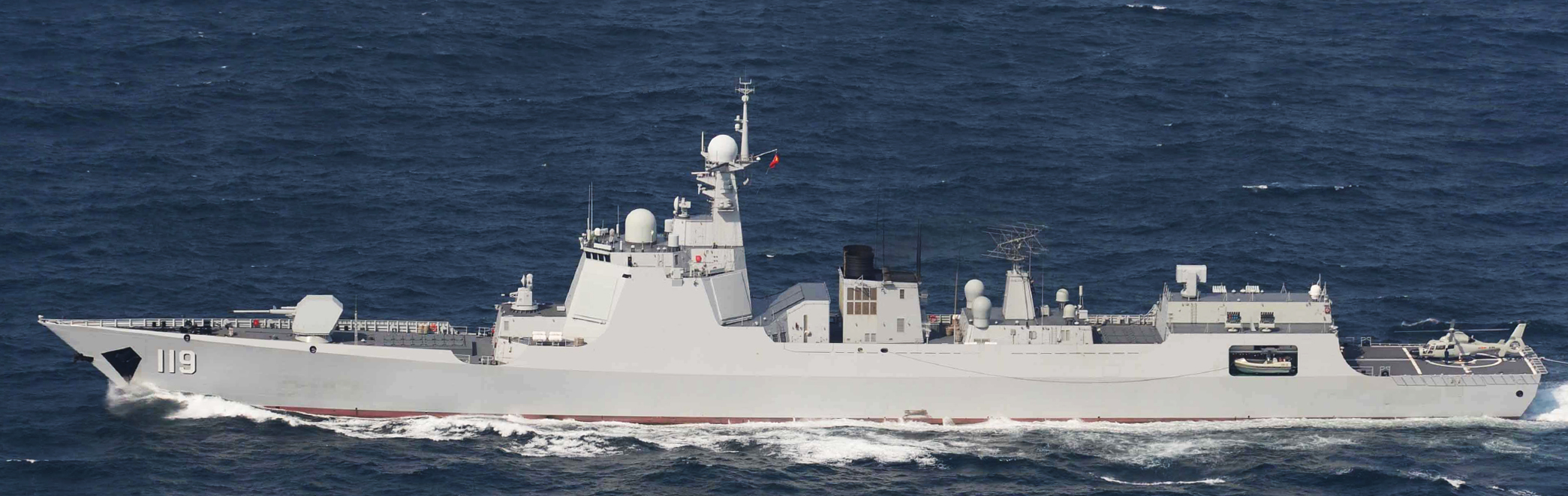 ４月２８日（火）午前９時頃、海上自衛隊第５護衛隊所属「こんごう」（佐世保）、第１２護衛隊所属「うみぎり」（呉）及び第５航空群所属「Ｐ－３Ｃ」（那覇）が、宮古島の南東約８０ｋｍの海域を北西進する中国海軍クズネツォフ級空母「遼寧」１隻、ルーヤンⅢ級ミサイル駆逐艦２隻、ジャンカイⅡ級フリゲート ２隻及びフユ級高速戦闘支援艦１隻の計６隻を確認した。 その後、これらの艦艇が沖縄本島と宮古島の間の海域を北上し、東シナ海へ向けて航行したことを確認した。 なお、これらの艦艇は、４月１０日（金）に男女群島（長崎県）南西で確認され、その後、沖縄本島と宮古島の間の海域を南下したものと同一である。